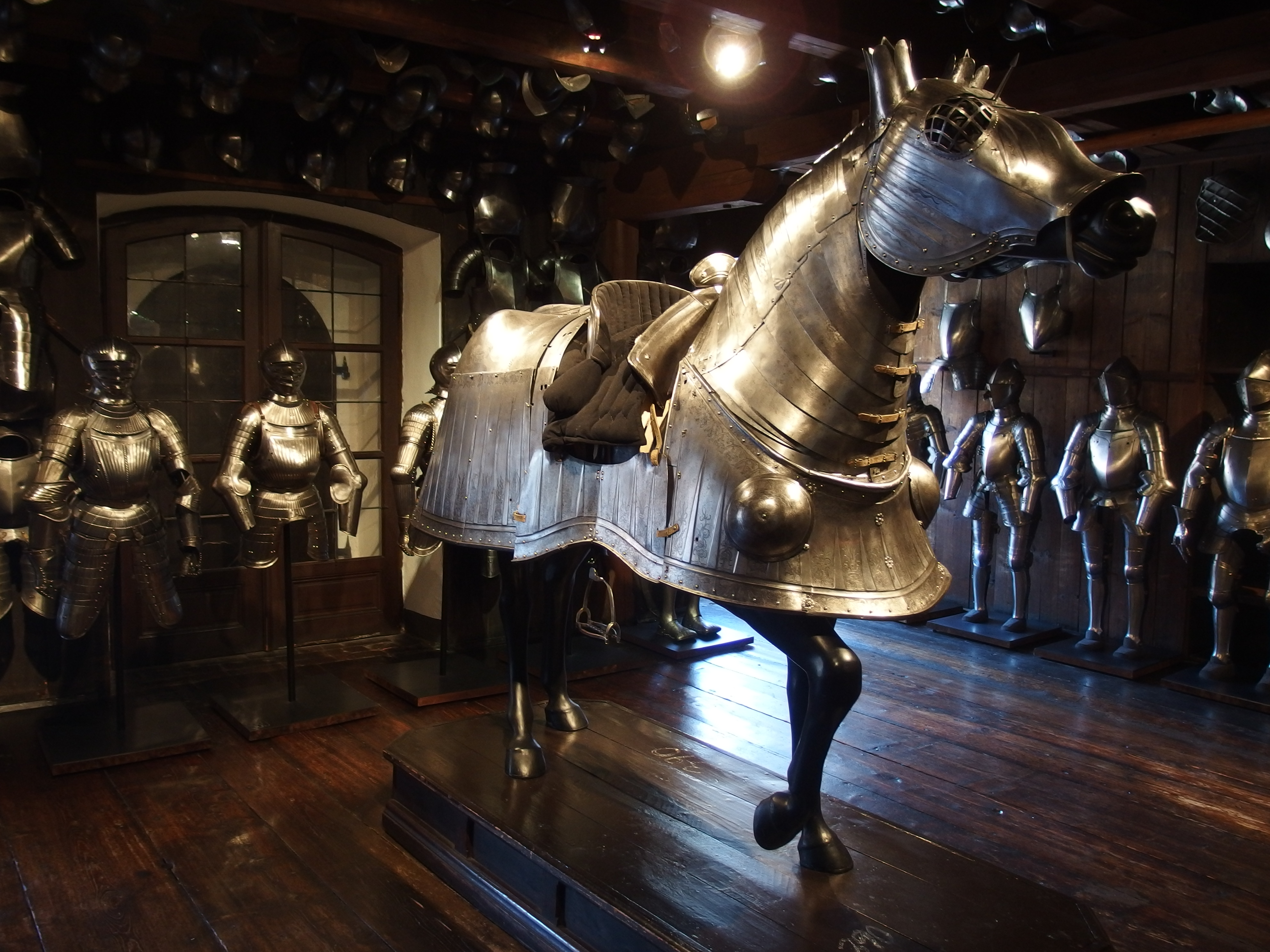 Roßharnisch von Konrad Seusenhofer aus dem frühen 16. Jahrhundert